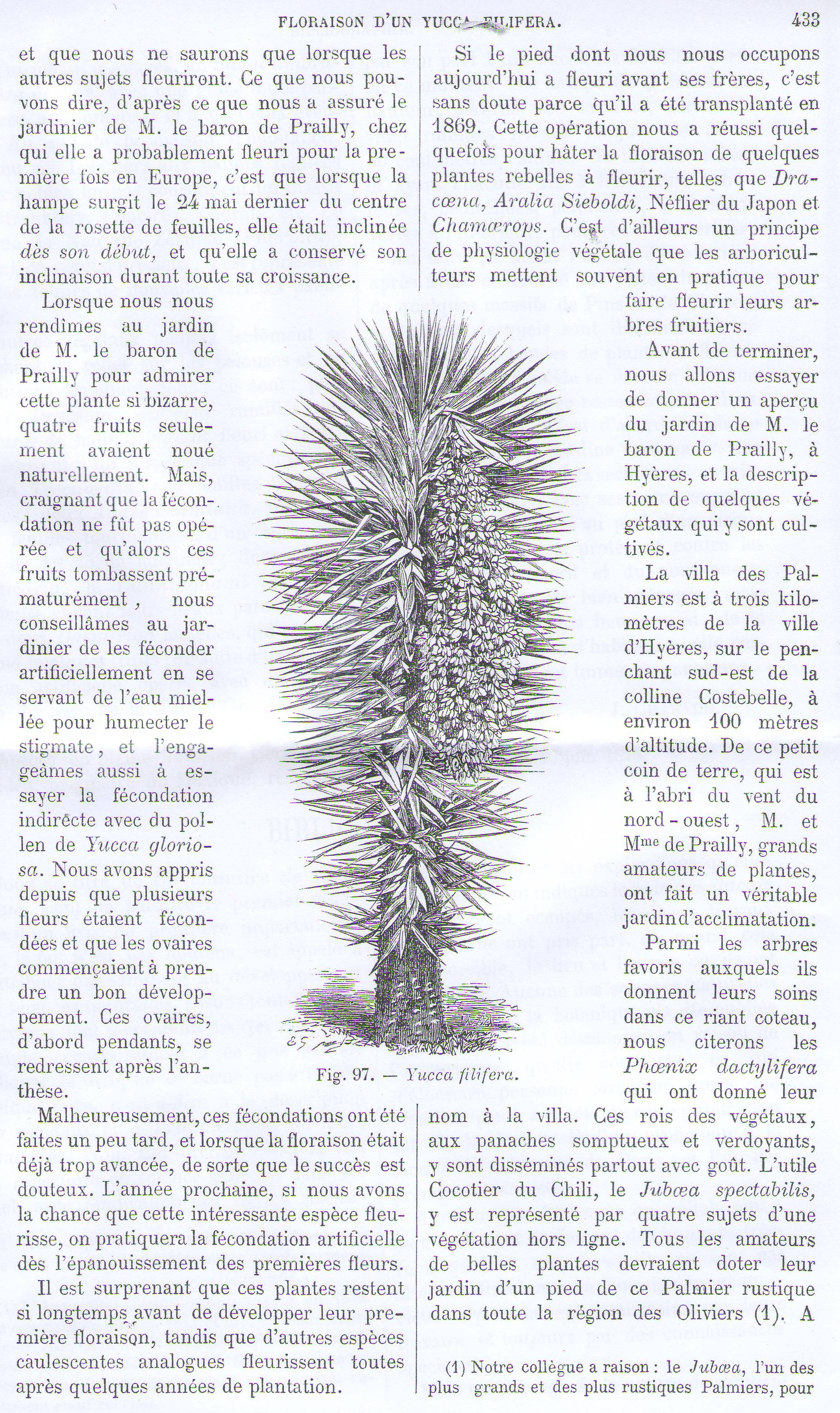 Floraison du Yucca des Prailly